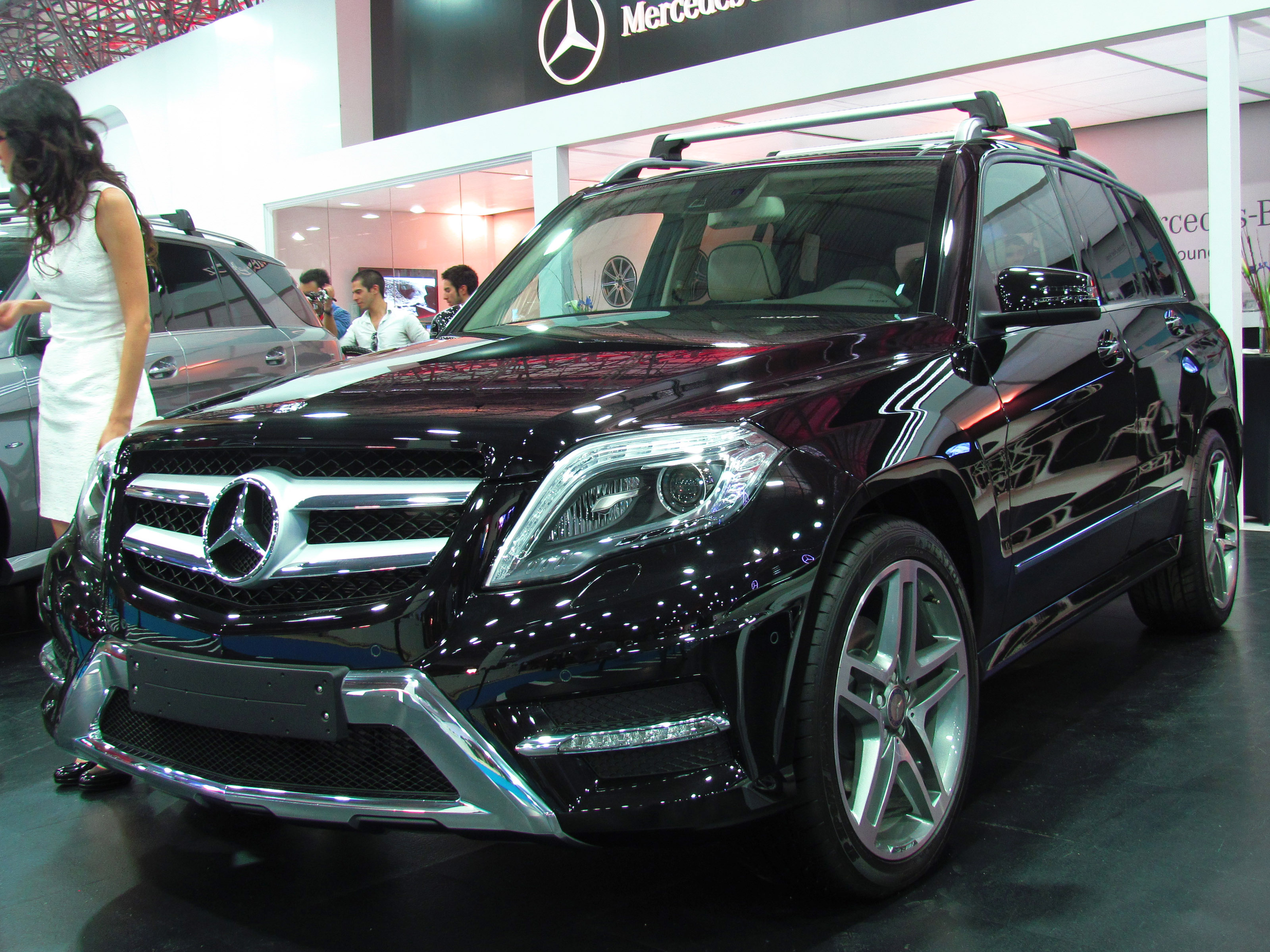 Mercedes Benz GLK 220 CDi 4Matic 2013